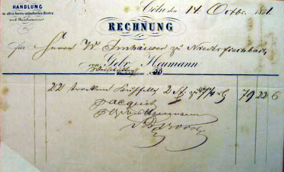 Gebr. Heumann, Cöln, Weißbüttengasse No. 33 (durchgestrichen: Thieboldsgasse No. 69) Handlung in allen Sorten inländischen Häuten und Rauchwaren. Rechnung vom 14. Oktober 1851 für Herrn W. Imhä[user?] zu Niederfischbach für 22 trockene Kuhfelle, 2 St. zu 7 1/4 [...?] = 79-22-6 [...]